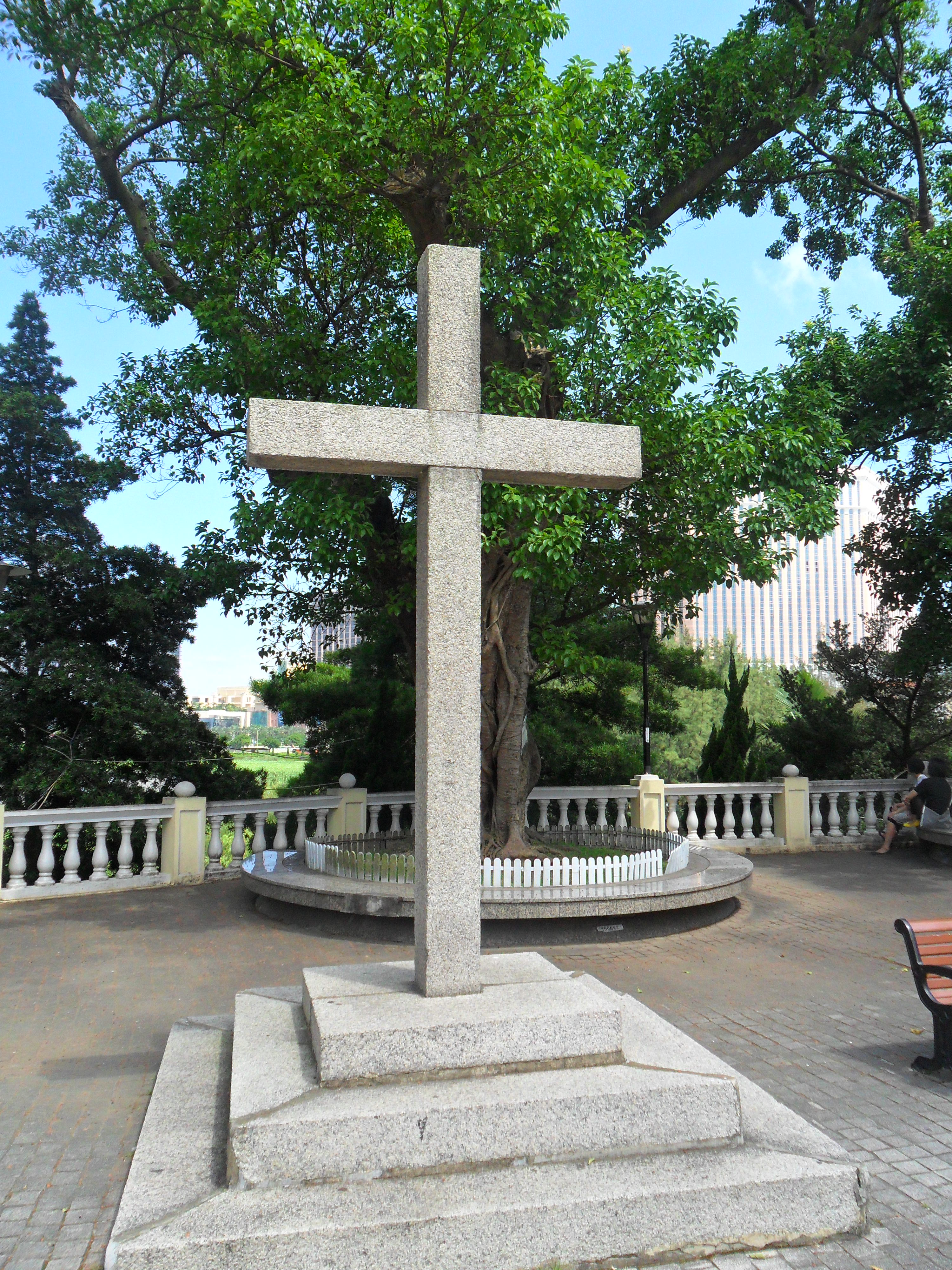 中文（香港）: 聖母玫瑰堂, 香港, 中國